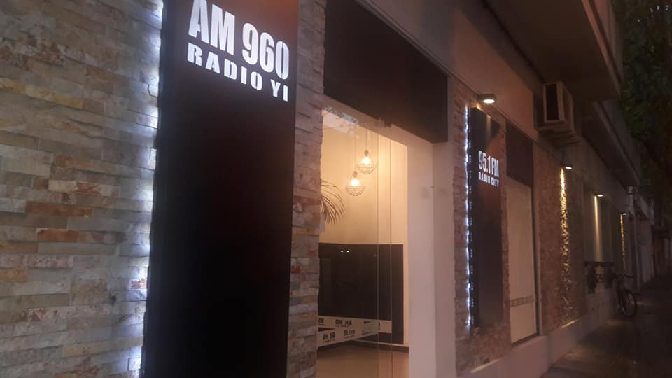 frente de AM 960 Radio Yi Durazno